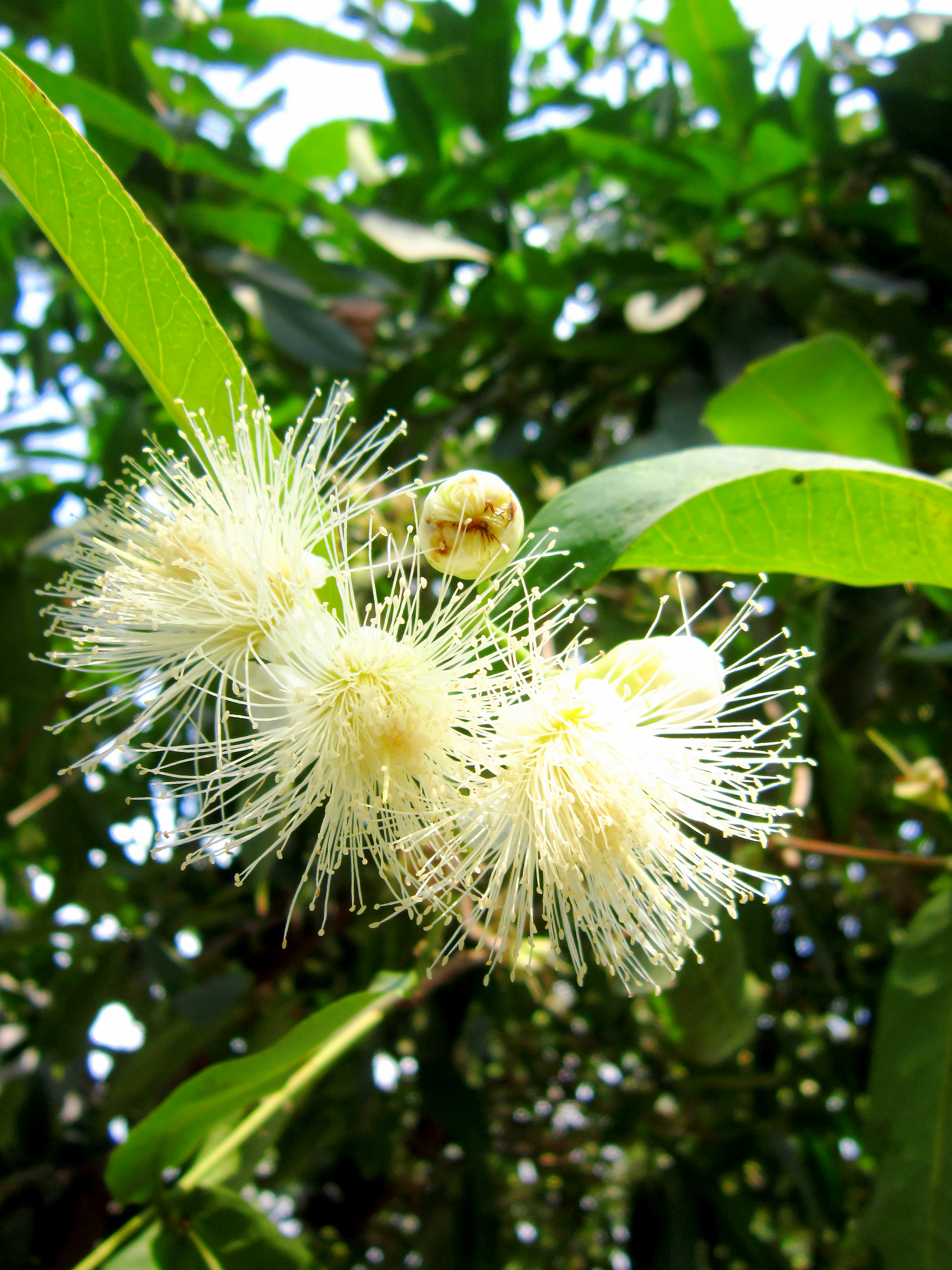 Hoa của loài roi (còn gọi là mận) hoa trắng.